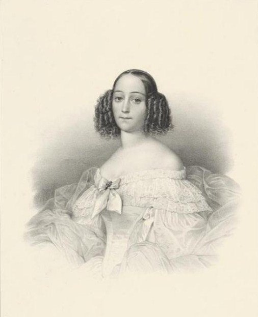 Графиня Александра Гавриловна Зубова, ур. Реймонд-де-Моден (08.09.1807—28.06.1839)